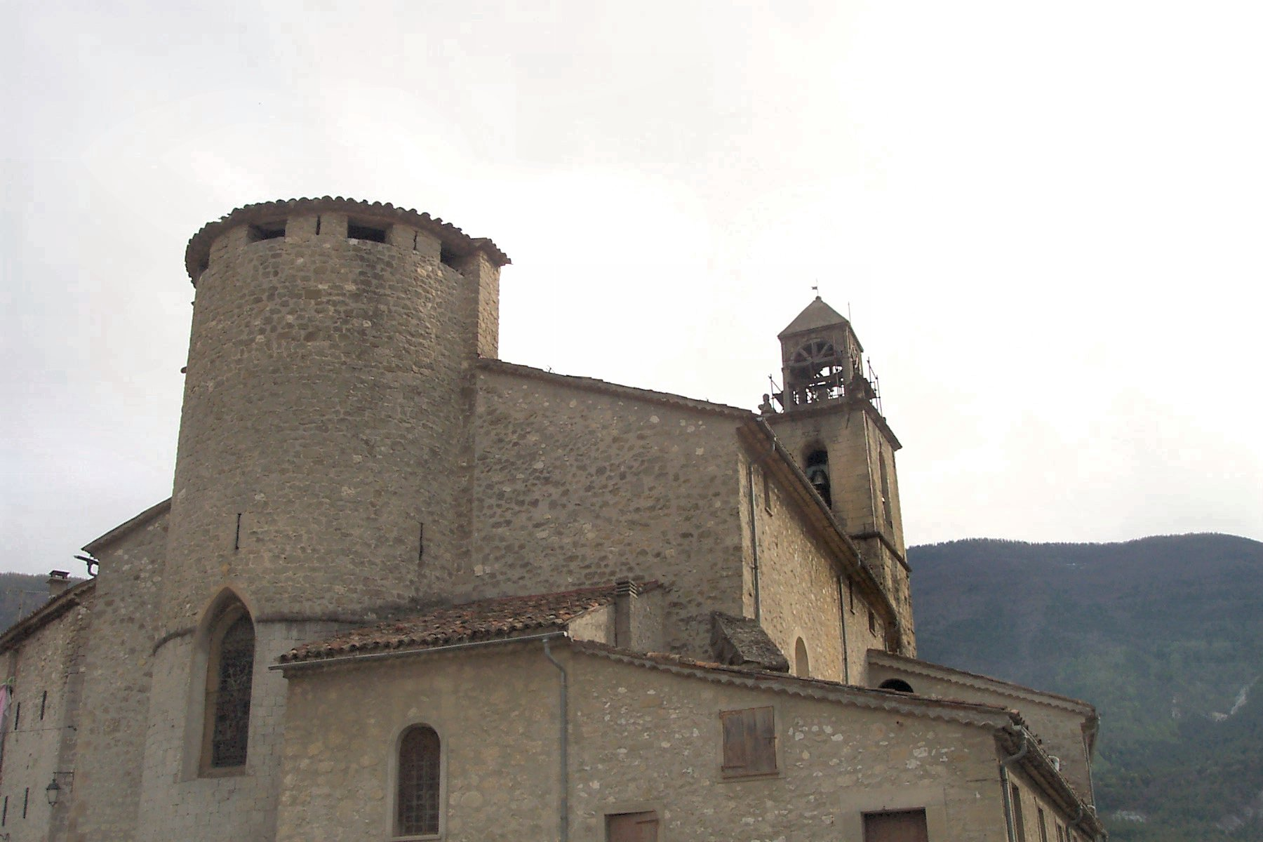 L'église